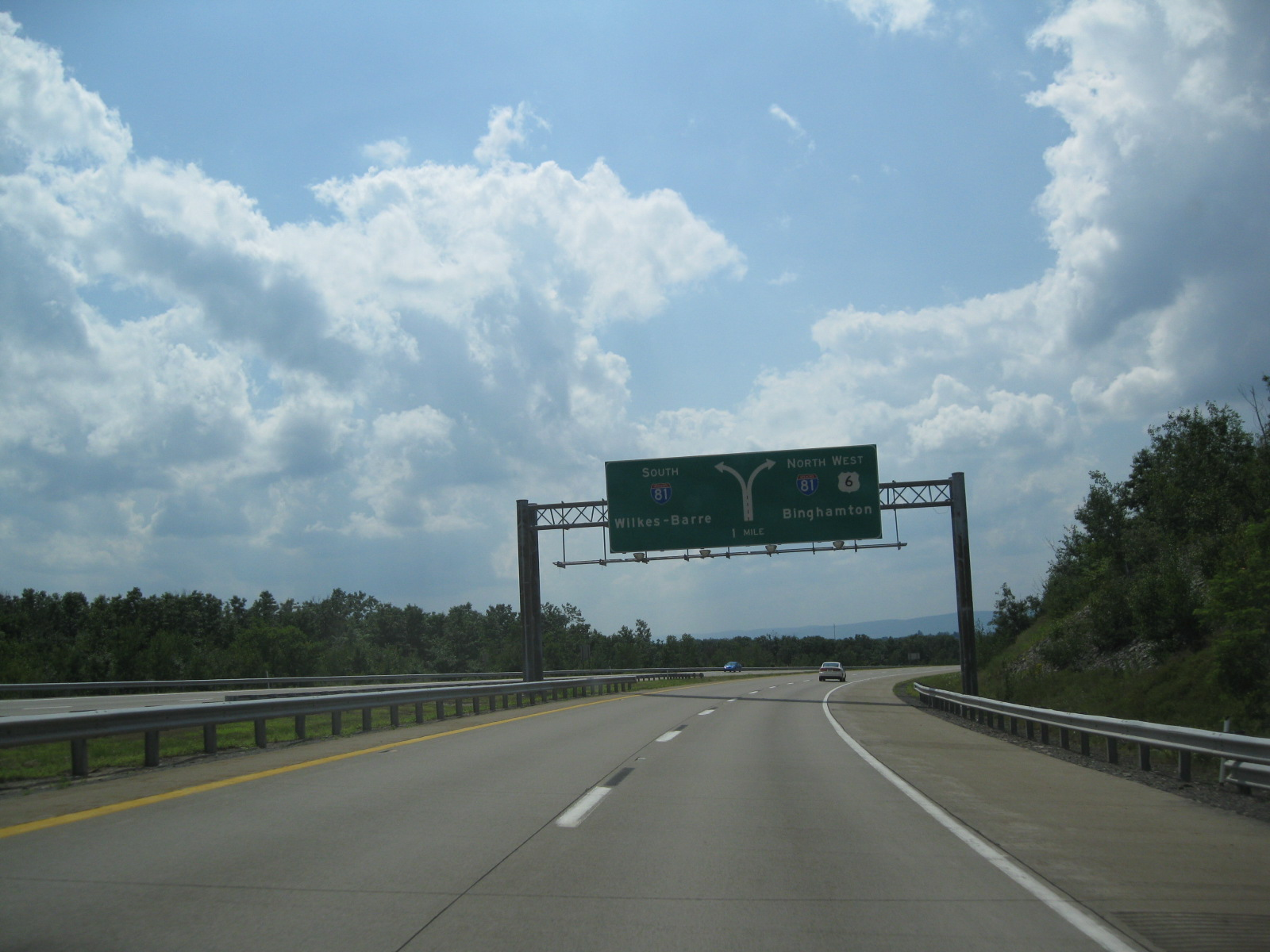 US Route 6 - Pennsylvania